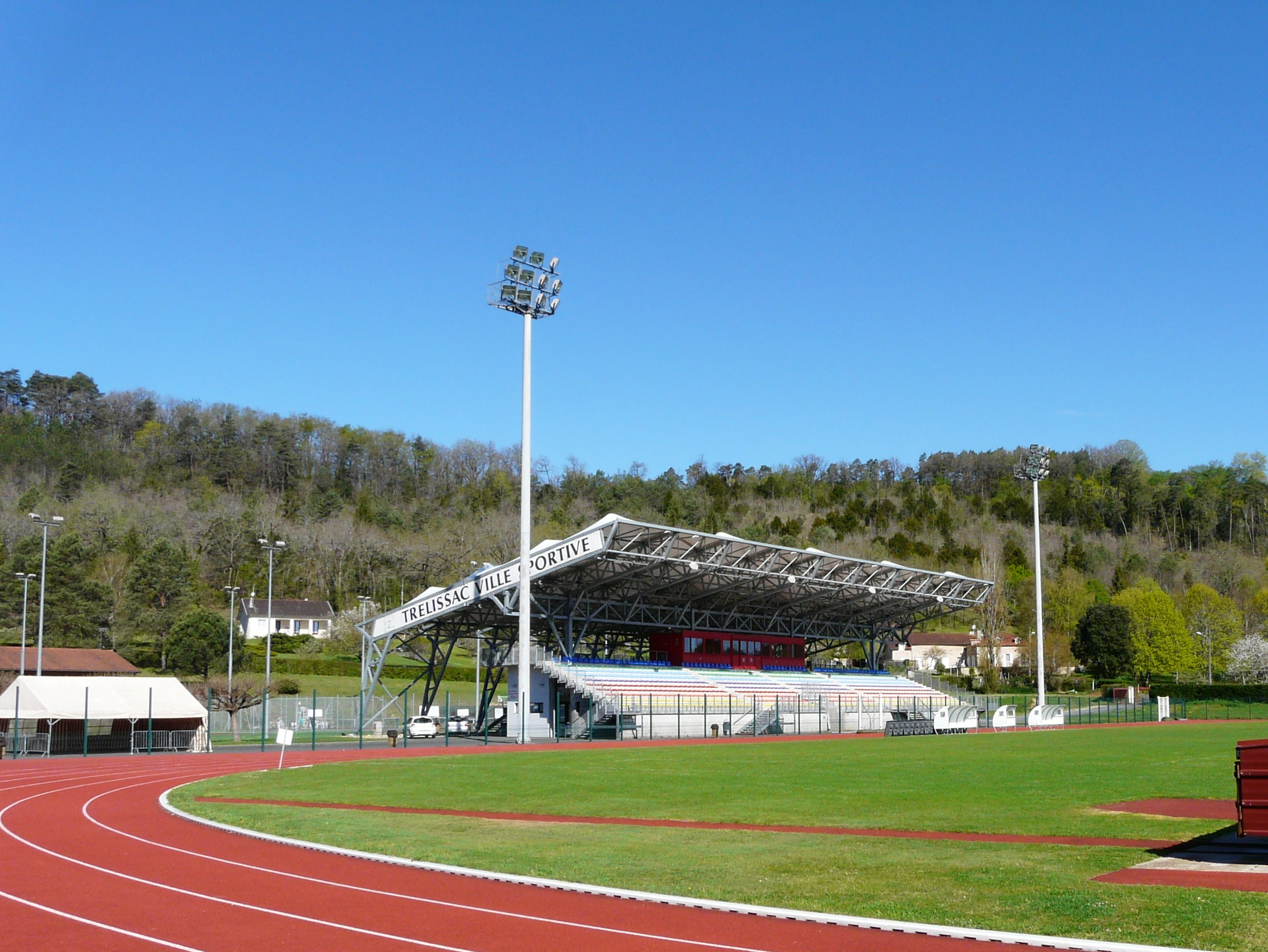 Le stade Firmin-Daudou, Trélissac, Dordogne, France.